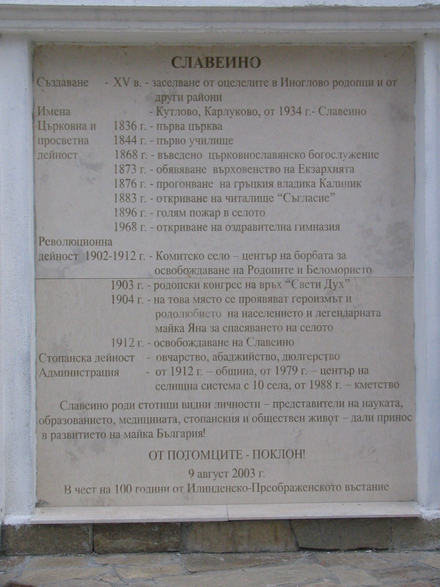 Кратка историческа справка за село Славейно